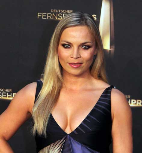 Regina Halmich beim Deutschen Fernsehpreis 2012